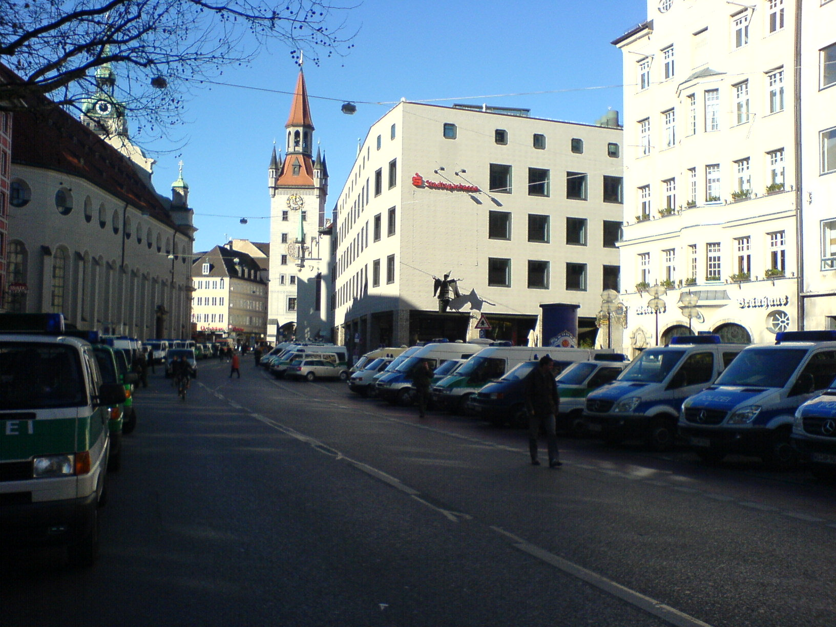 Bereitstellungsraum der Polizei vor der Münchner Konferenz für Sicherheitspolitik 2008 im Tal (Altstadt), verschiedene Verbände (v.a. BePo BaWü und BuPo)